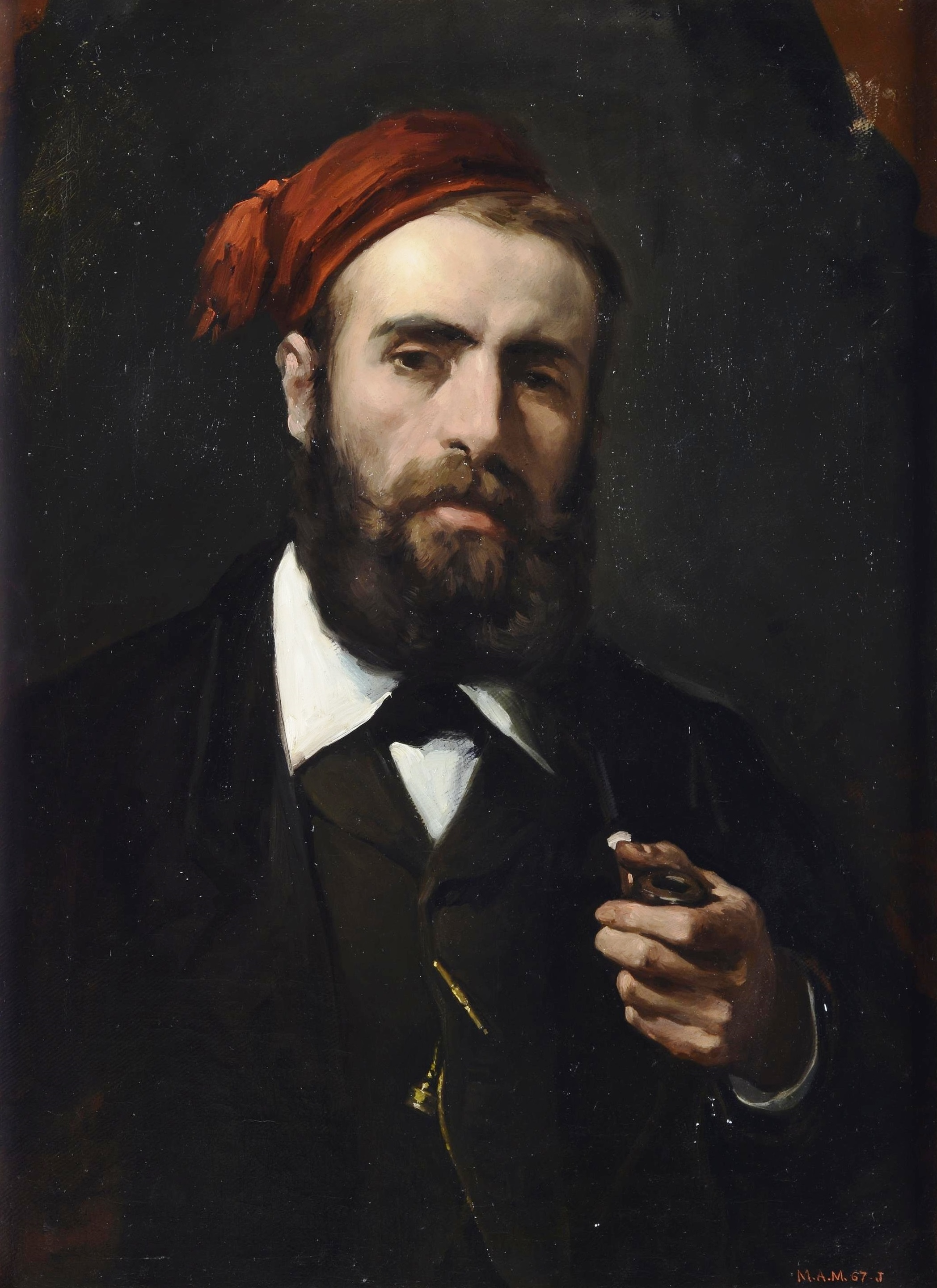 Retrato del pintor español Miguel Jadraque y Sánchez-Ocaña (1840-1919).